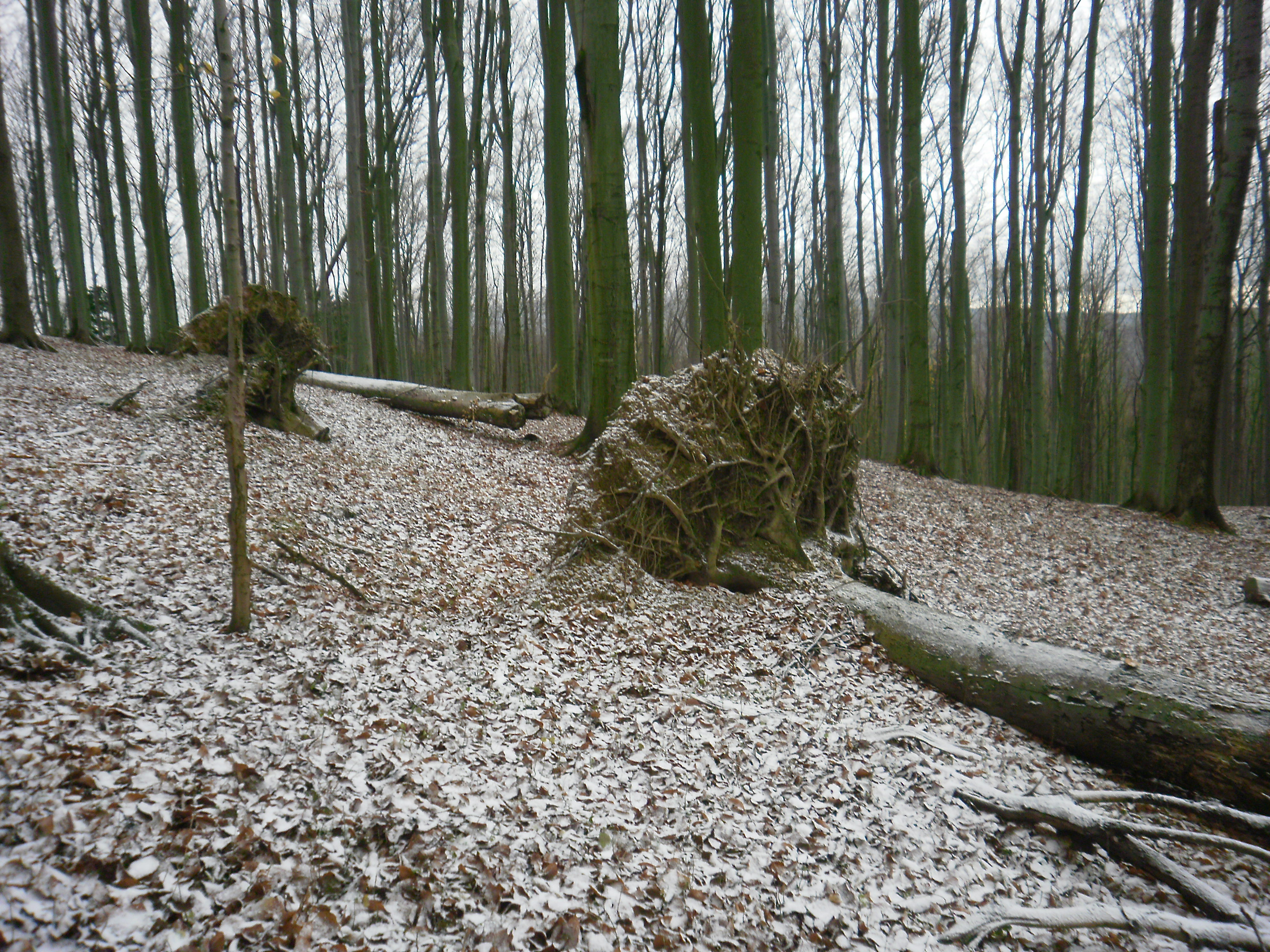 NPR Karlovské bučiny